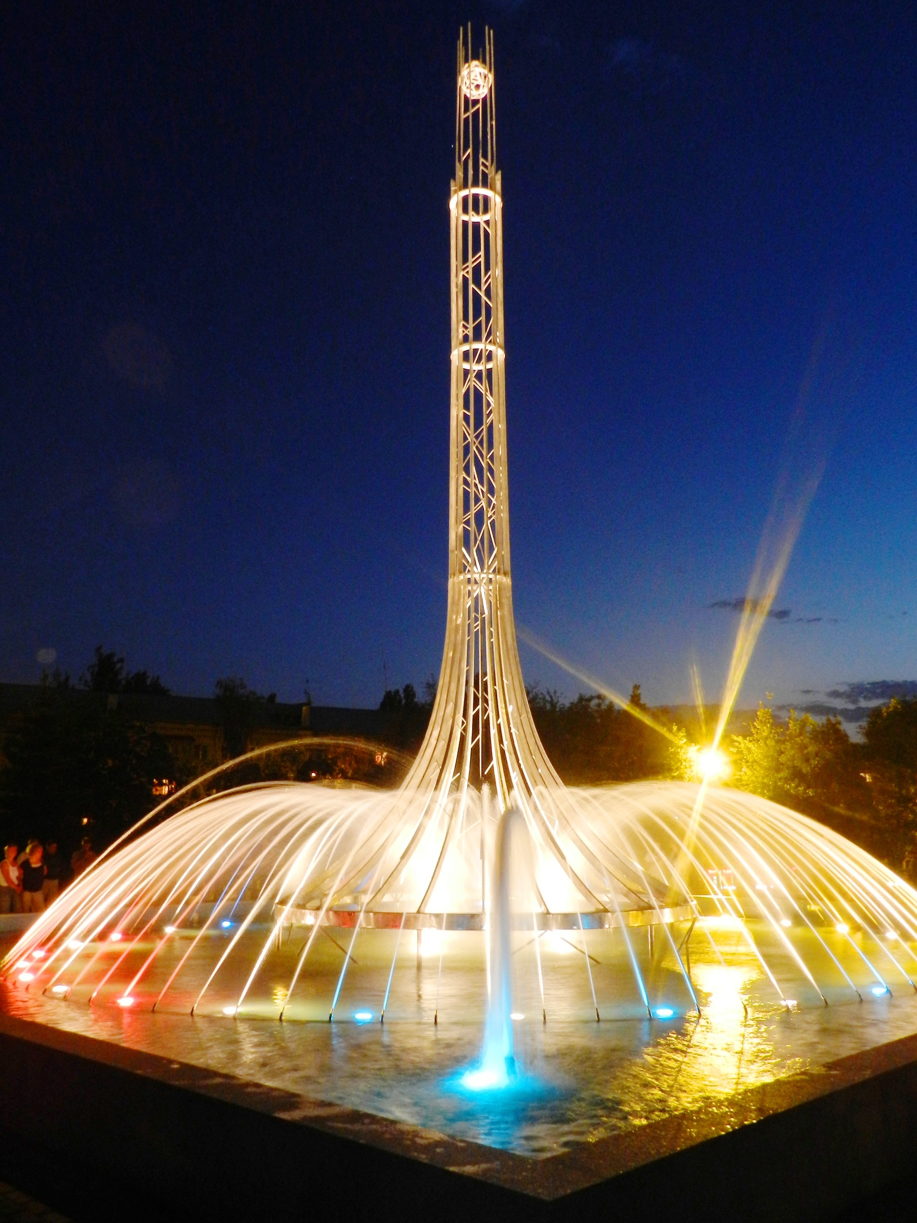 Фонтан у ДК "Рубин" не работал несколько десятков лет. В прошлом году городская власть, наконец-то, выделила средства на его реставрацию.